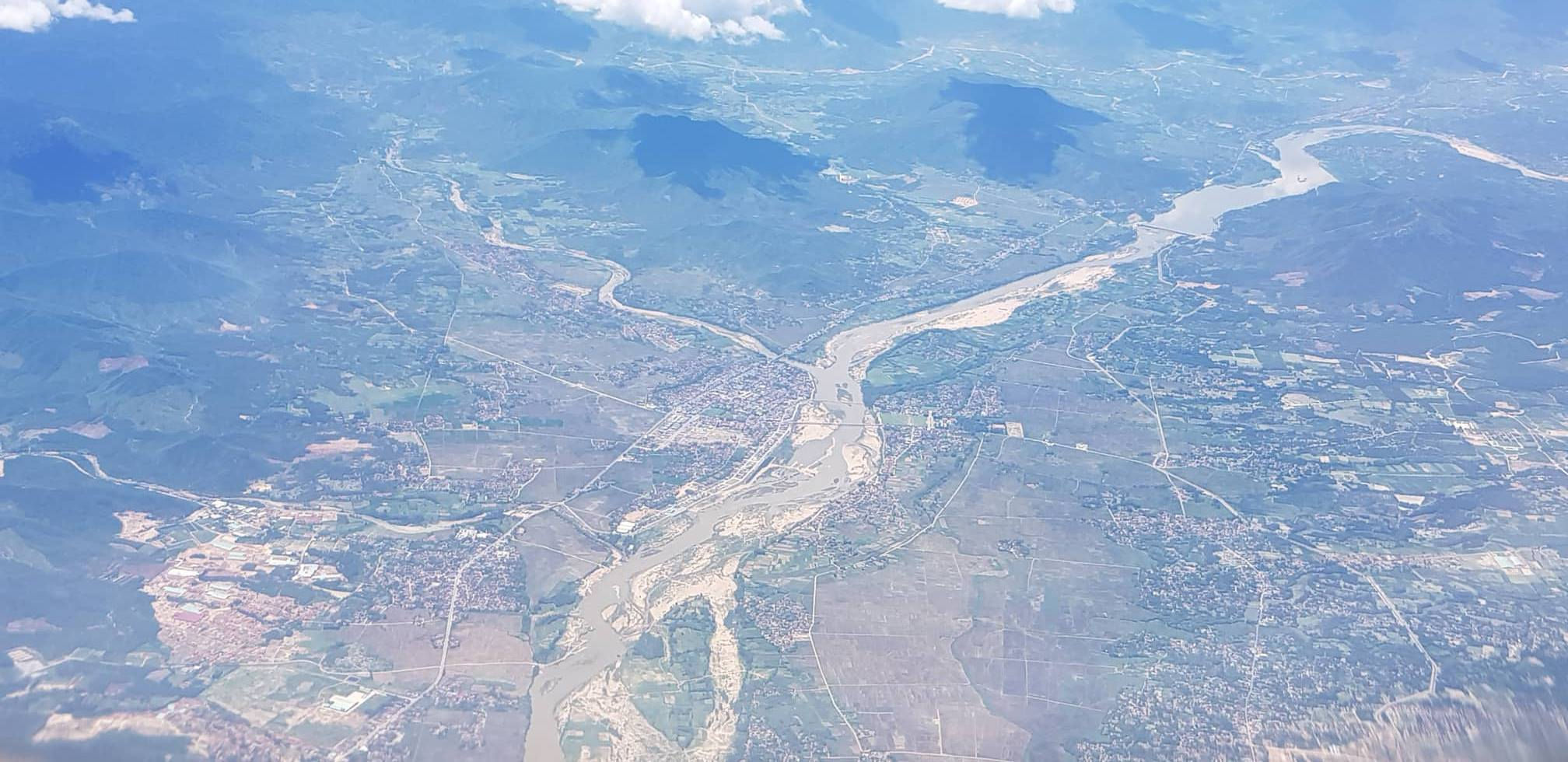 Thi tran Phu Phong, Tay Son, Binh Dinh, Vietnam